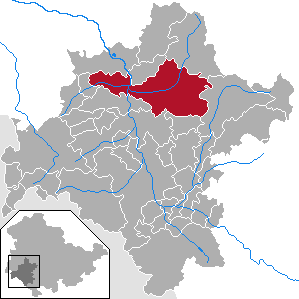 Schmalkalden in Thuringia - District Schmalkalden-Meiningen